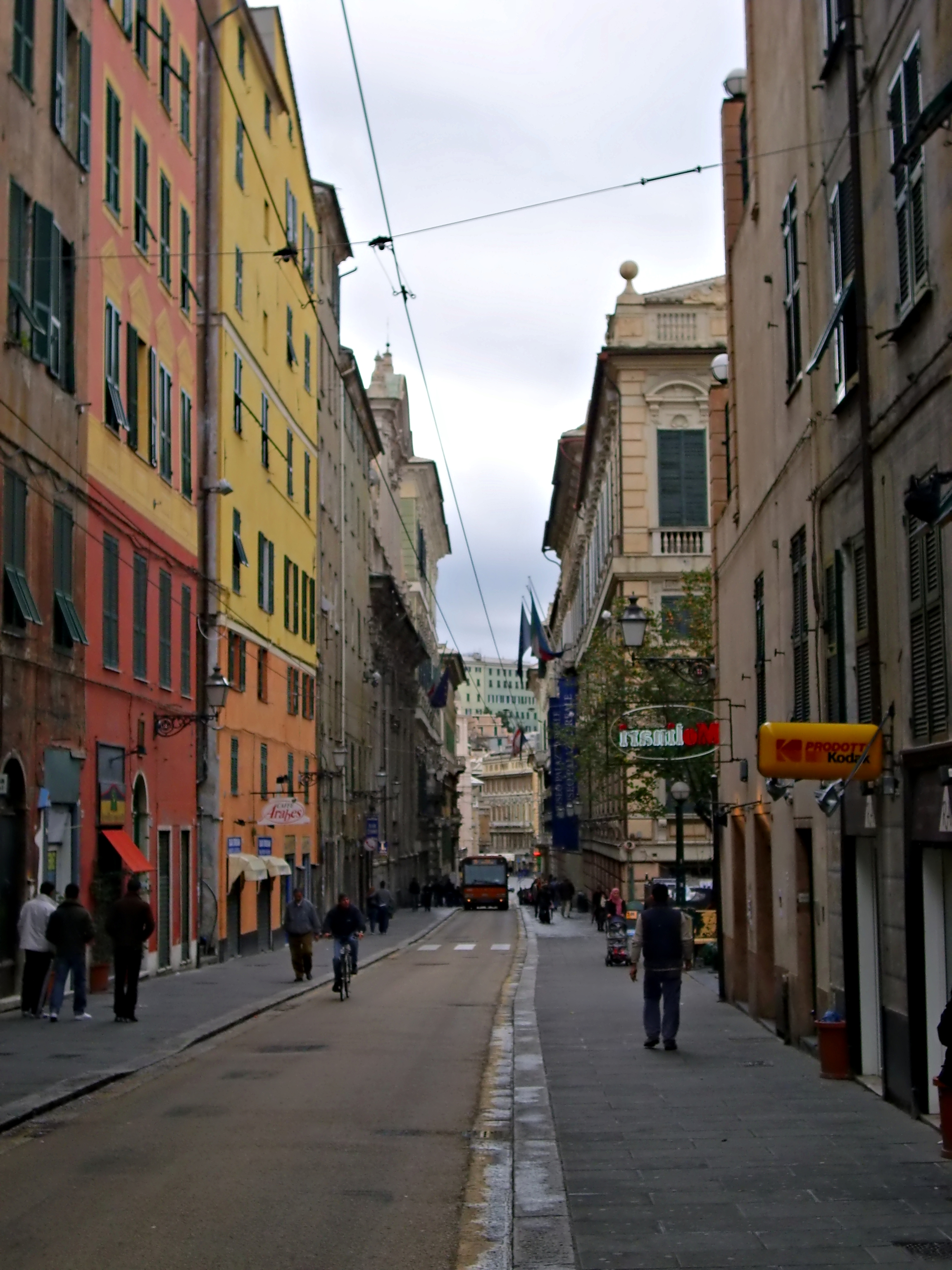 Via Balbi, Genova